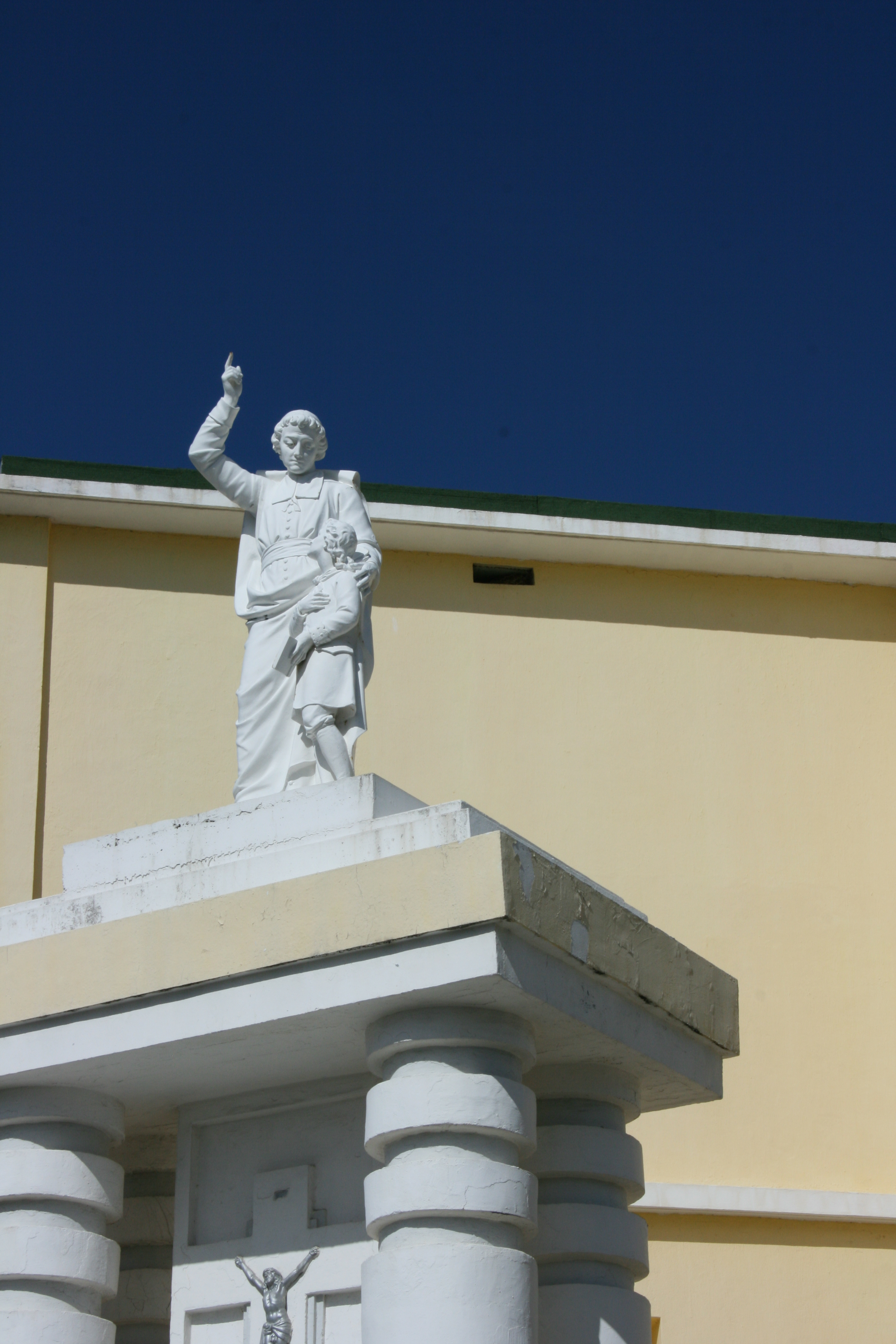 Statue de Saint Jean-Baptiste de la Salle, à l'angle du collège Saint-Michel, à Saint-Denis de La Réunion, où se croisent les rues Montreuil et Monseigneur de Beaumont.